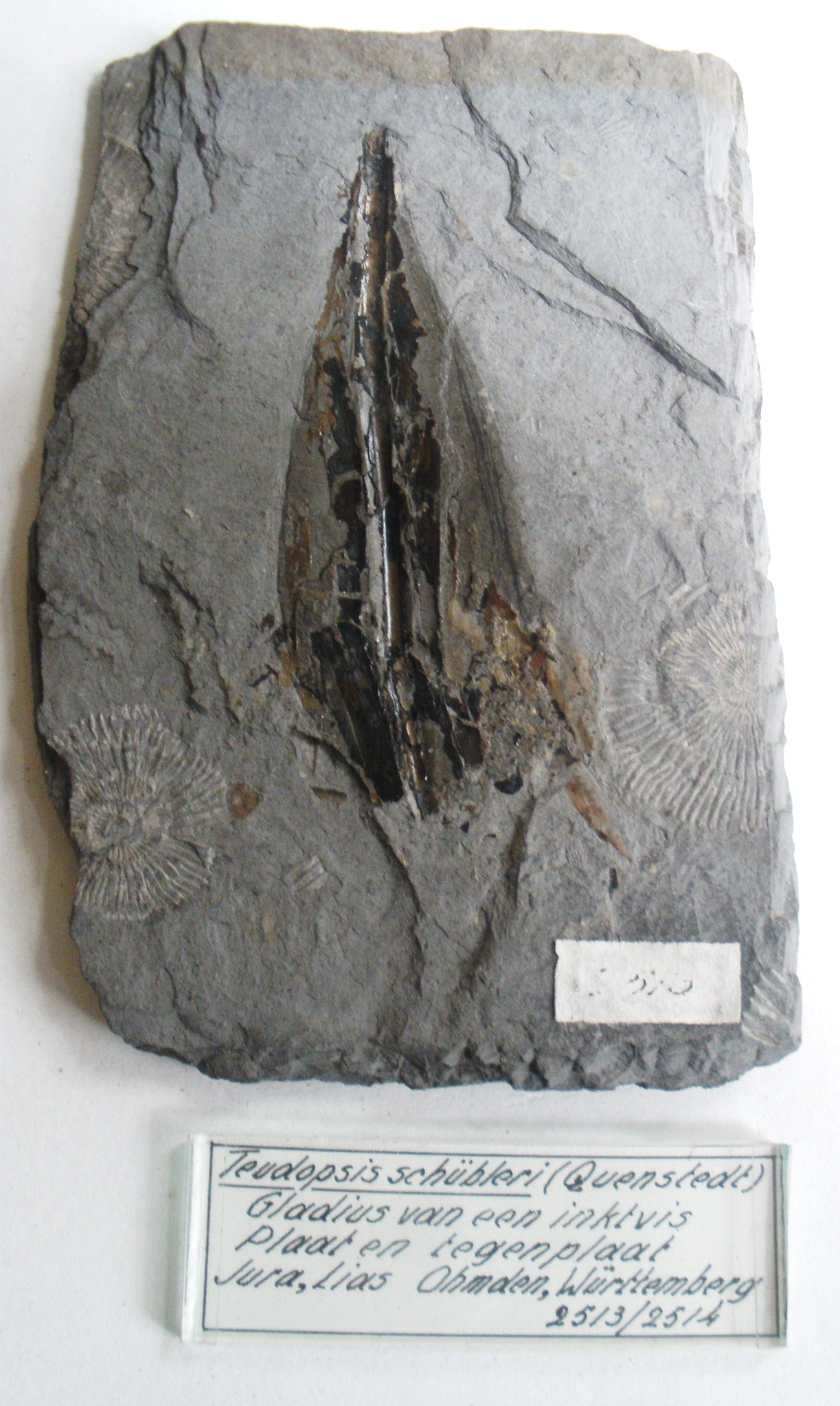 Fossil of Teudopsis, an extinct cephalopod- Took the photo at Teylers Museum, Haarlem